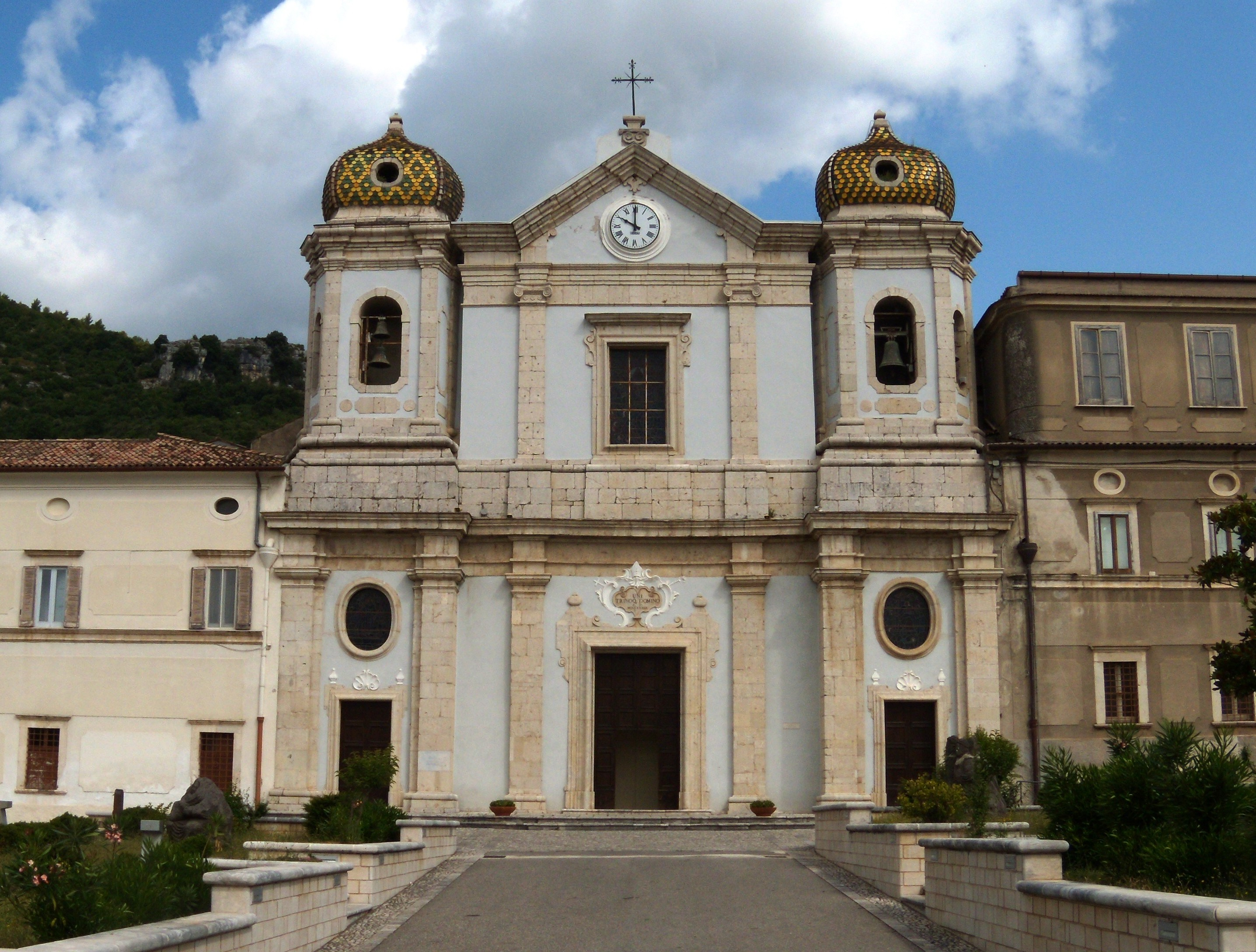 La Chiesa Cattedrale di Cerreto Sannita.